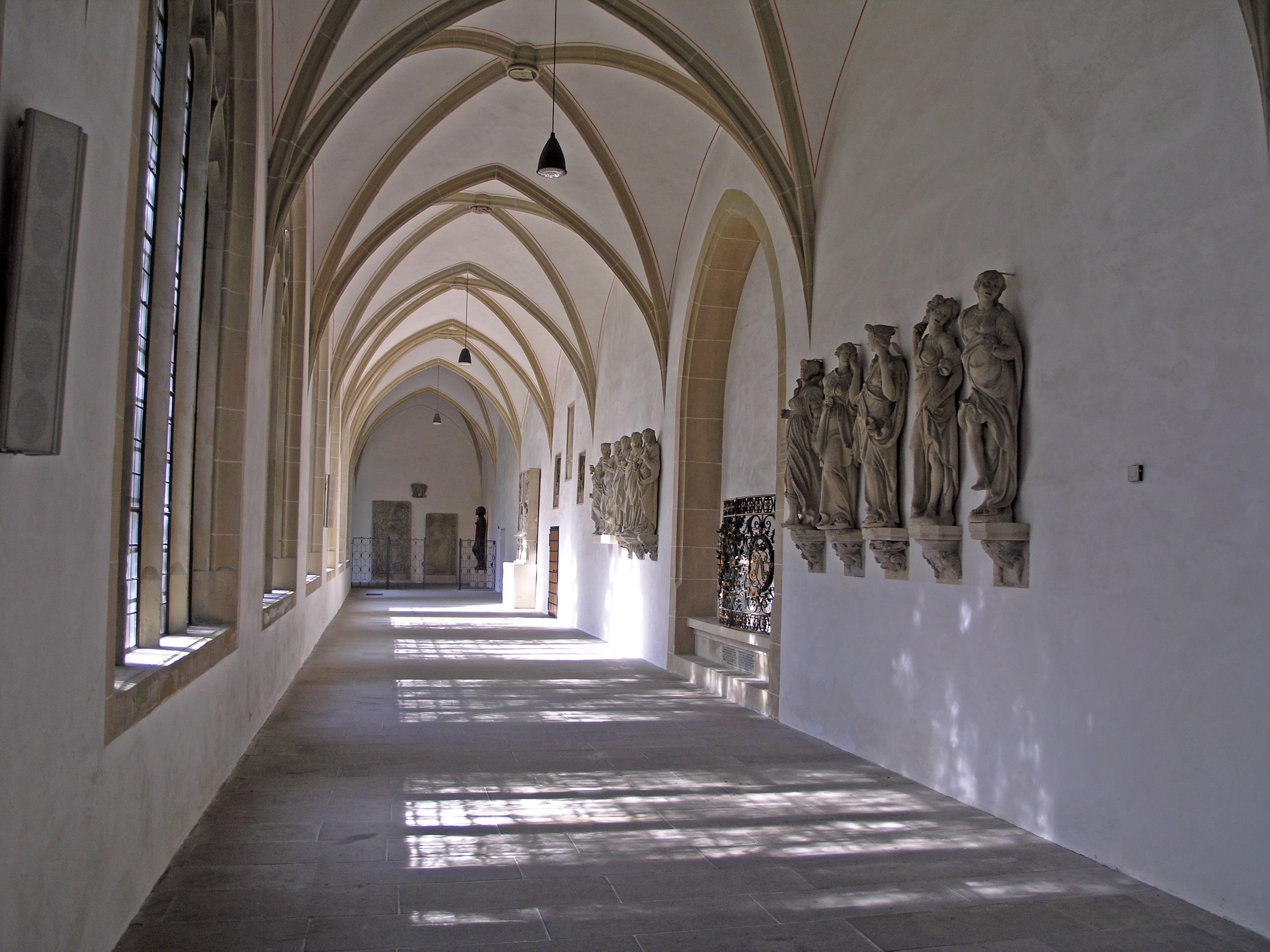 Северный Рейн - Вестфалия, Мюнстер - собор Святого Павла